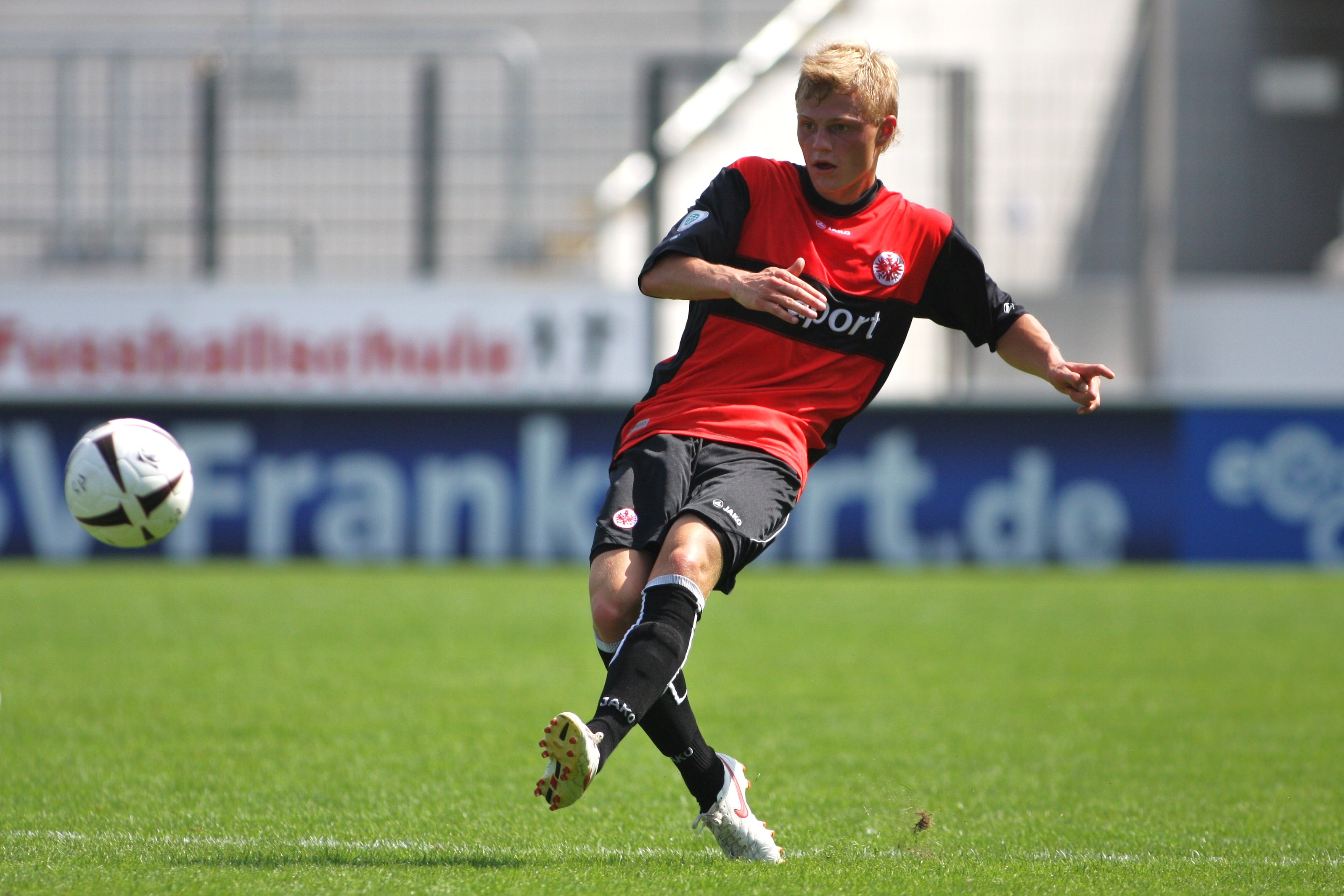 Eintracht Frankfurt-Spieler Marcel Titsch-Rivero 2009